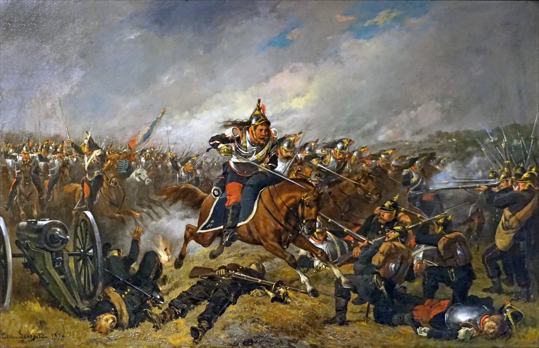 Il s'agit de la dernière charge des cuirassiers des 1er, 2ème, 3ème et 4ème régiments du général de Bonnemains. Elle sera infructueuse comme celle du 9ème régiment à Morsbronn mais leur sacrifice a permis, dit-on, la retraite de l'armée française. Le musée de la bataille du 6 août 1870 est situé dans l'ancien donjon du château à Woerth en Alsace. Il fait partie des musées du Parc régional des Vosges du nord. Il est consacré à la bataille du 6 août 1870 entre l'armée française (positionnée à Froeschwiller et commandée par Mac-Mahon) et les armées allemandes coalisées autour de la Prusse (positionnées à Woerth). Le nom de Reichshoffen lui a été historiquement associé alors qu'elle ne s'y est pas déroulée. Cette bataille, qui a fait 20.000 morts dans les deux camps, marque le début de la guerre franco-allemande de 1870-1871 perdue par la France et qui a abouti à l'annexion par l'Allemagne de l'Alsace et de la Lorraine (région de Metz). Les répercussions de cet affrontement ont été considérables car les deux grandes guerres, qui se sont produites au XXè siècle, en sont le prolongement. Le musée de Woerth vient de rouvrir après une période de rénovation. La visite du musée peut être complétée par celle du champ de bataille et des monuments français et surtout allemands qui y ont été érigés. En effet, cette région a fait l'objet durant l'occupation allemande jusqu'en 1918 d'un tourisme important de la part des allemands venant célébrer le sacrifice de leurs soldats.